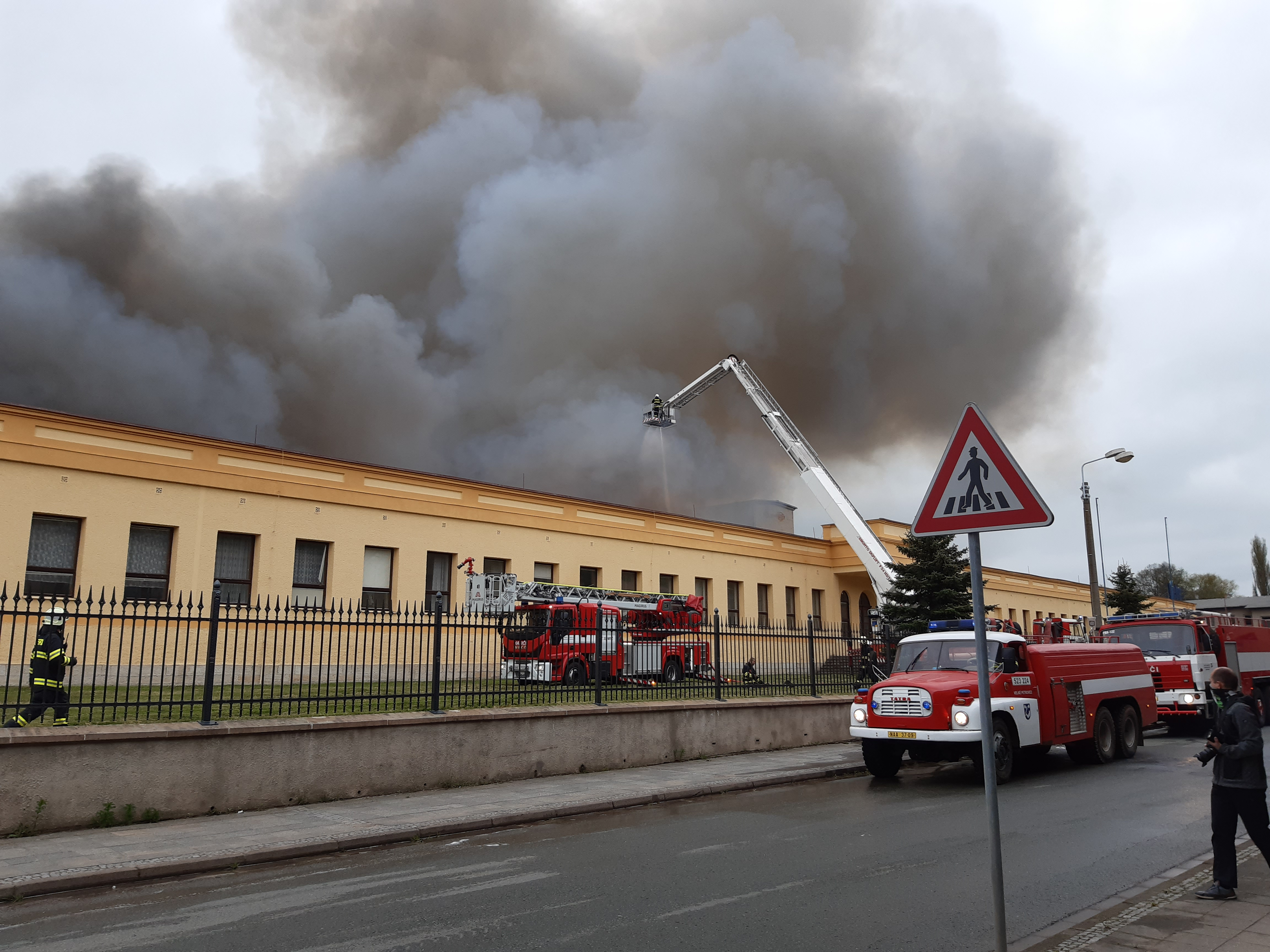 Hasiči zasahující u požáru ve firmě HAUK v Polici nad Metují.